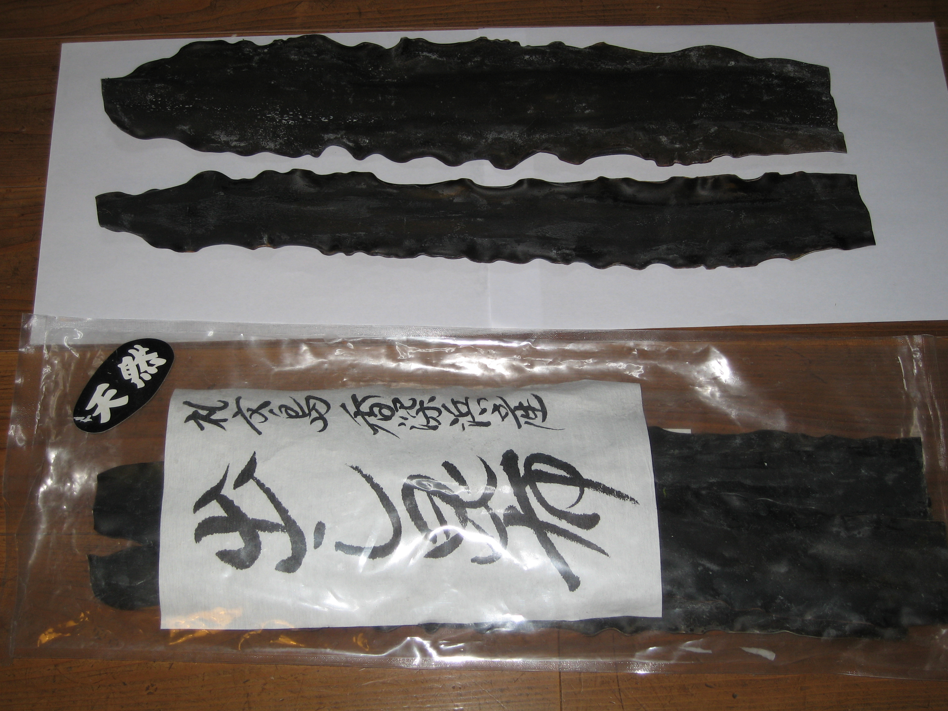 礼文島香深浜産の利尻昆布